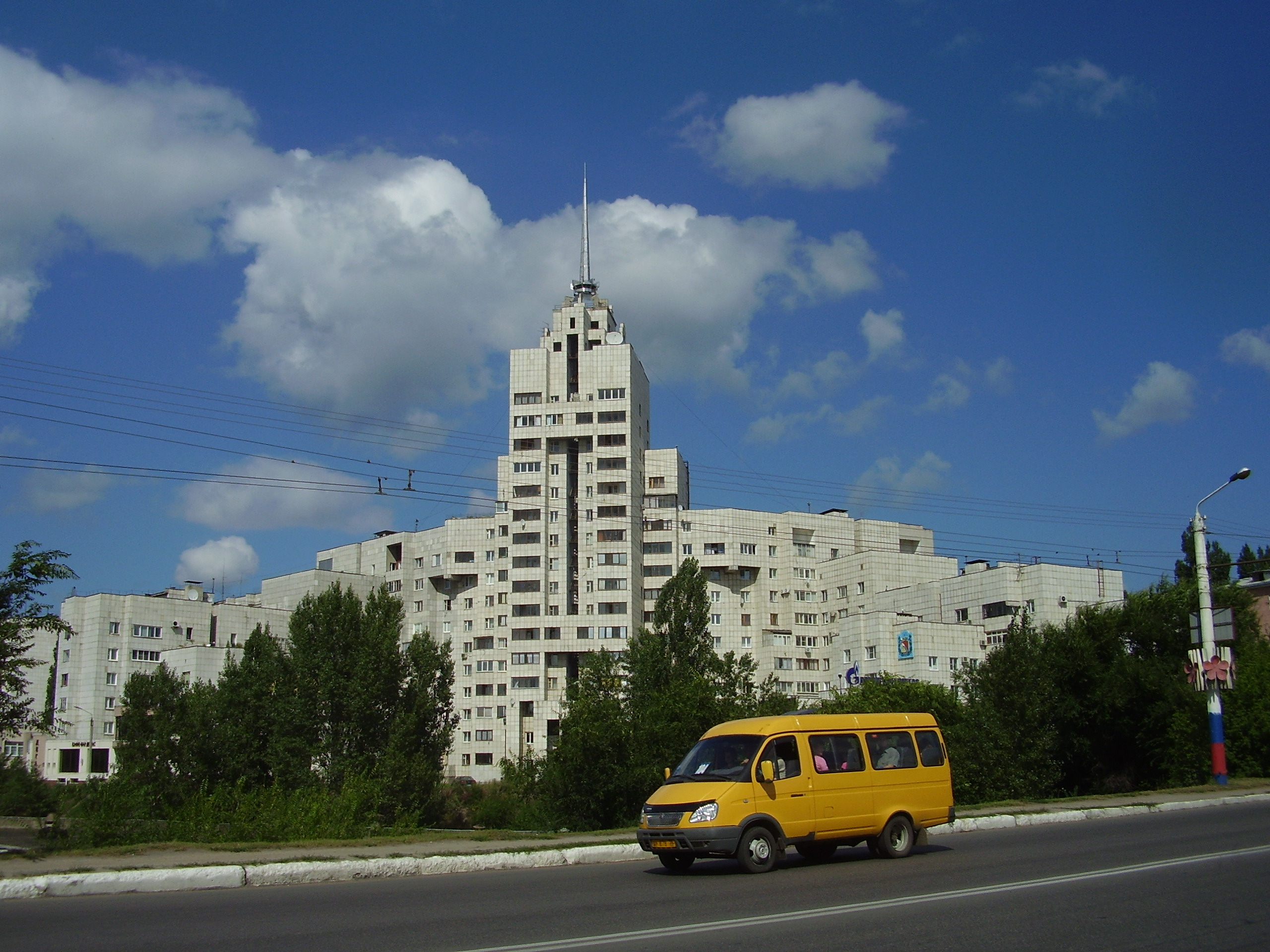 Воронеж,здание при въезде на Левый берег с Чернавского моста